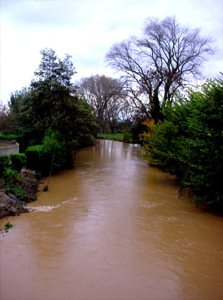 Les efforts des industries et des communes contre la pollution ont porté leur fruits, améliorant beaucoup la qualité de leurs rejets à partir des années 1995, mais l'intensification de l'agriculture a fortement augmenté dans la même période (remembrement, suppression des pâtures, drainage des zones humides, etc). La turbidité induite par l'érosion et la pollution par les engrais et pesticides ont alors remplacé la pollution industrielle.